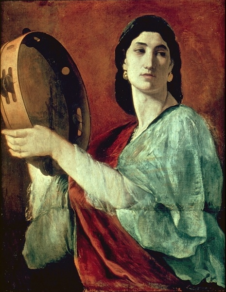 Mirjam